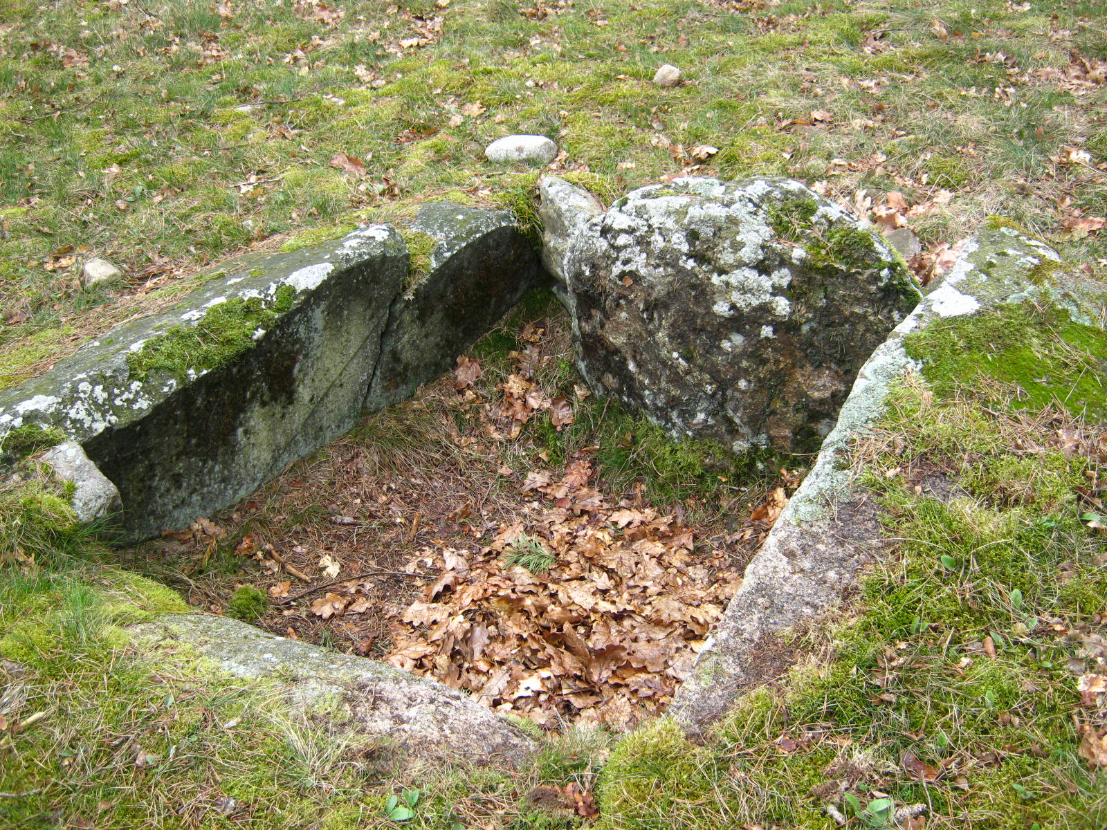 Steinkiste eines Dolmengrabes 2500 v.Chr. bei Rolfsen in der Lüneburger Heide.